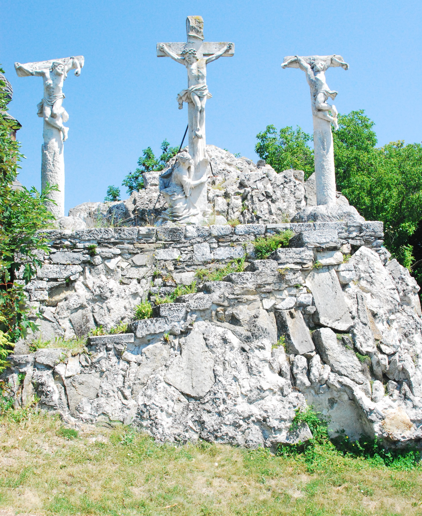 Kalvarienberg bei der Kirche von Kühnring in Niederösterreich